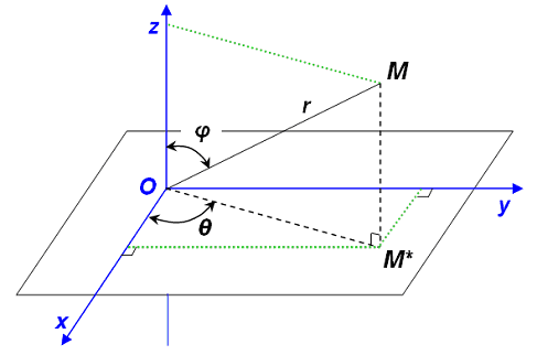 Spherical coordinates. Сферични координати